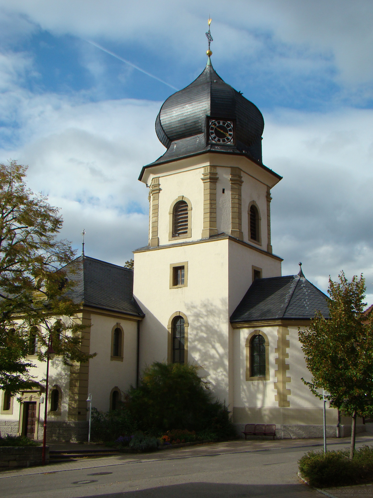 Evangelische Kirche in Obersulm-Affaltrach